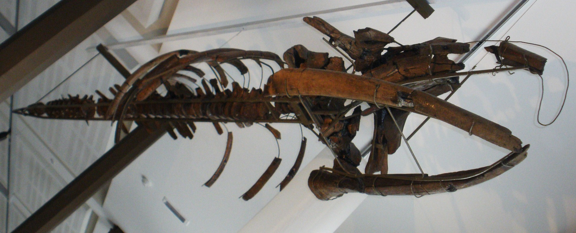 Fossil of Balaenula, an extinct whale Took the photo at Musee d'Histoire Naturelle, Brussels